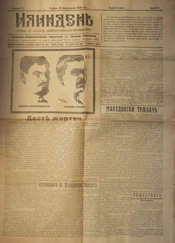 Вестник на "Илинден".